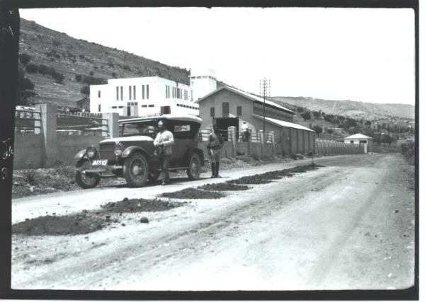 מבנה תחנת הכוח וכביש הגישה לחיפה מכיוון מזרח